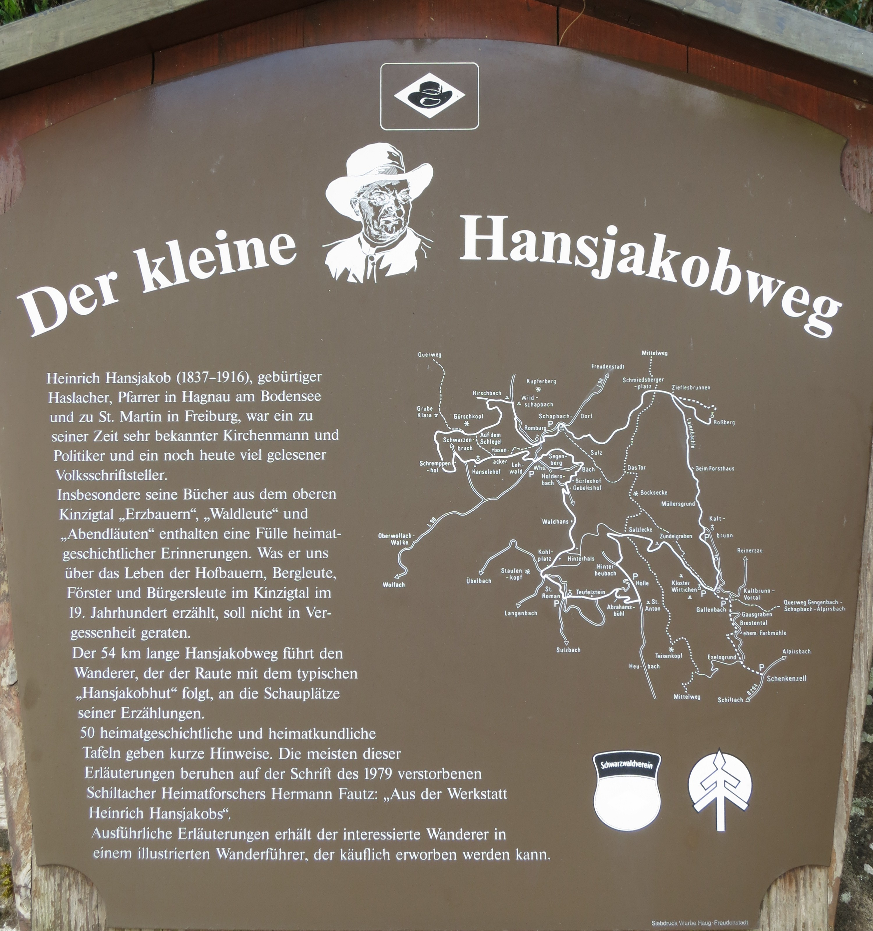 Wegtafel des Kleinen Hansjakobwegs in Schapbach.